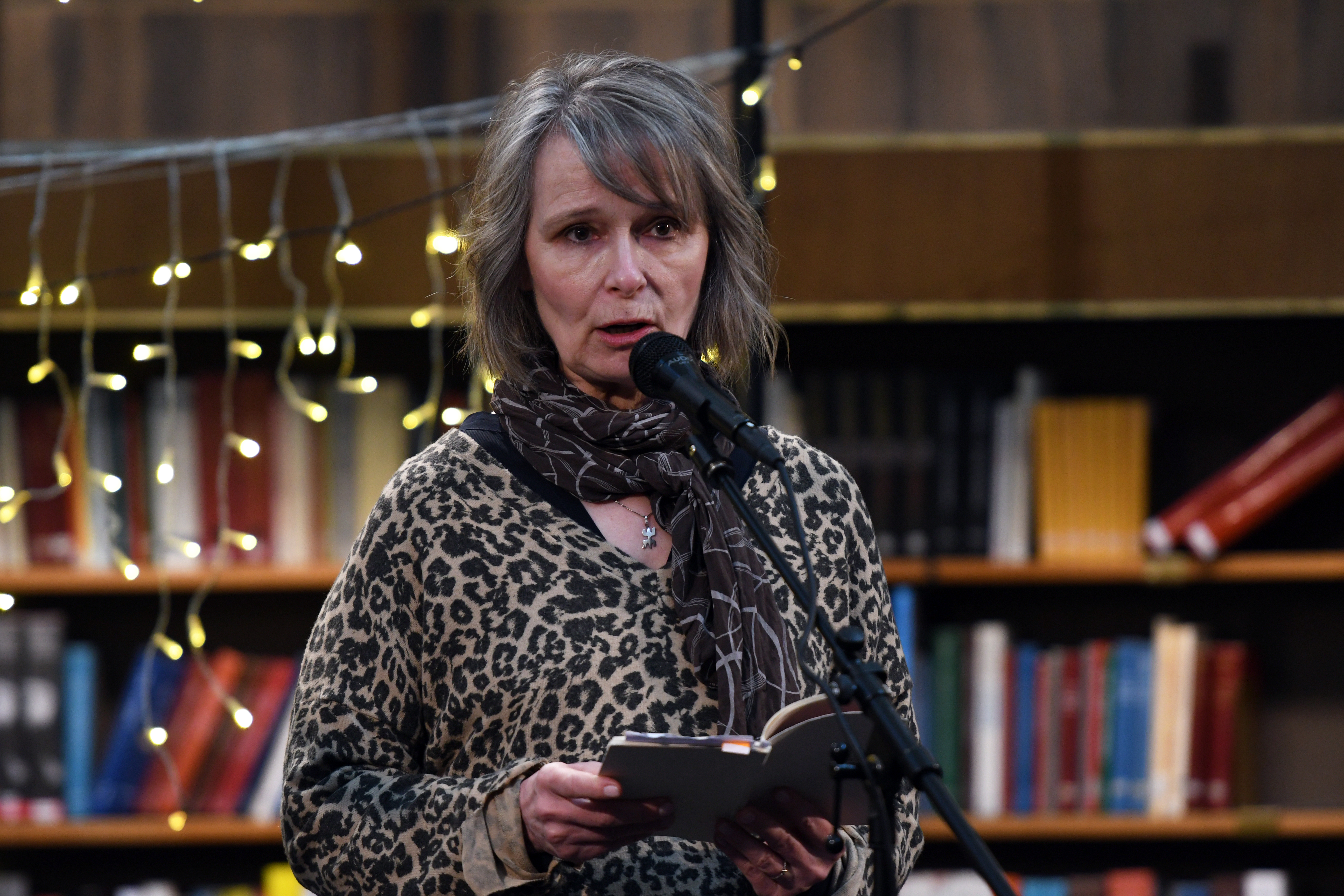 Poesimässan 2019, Stockholms stadsbibliotek. Linda Vilhjálmsdóttir.